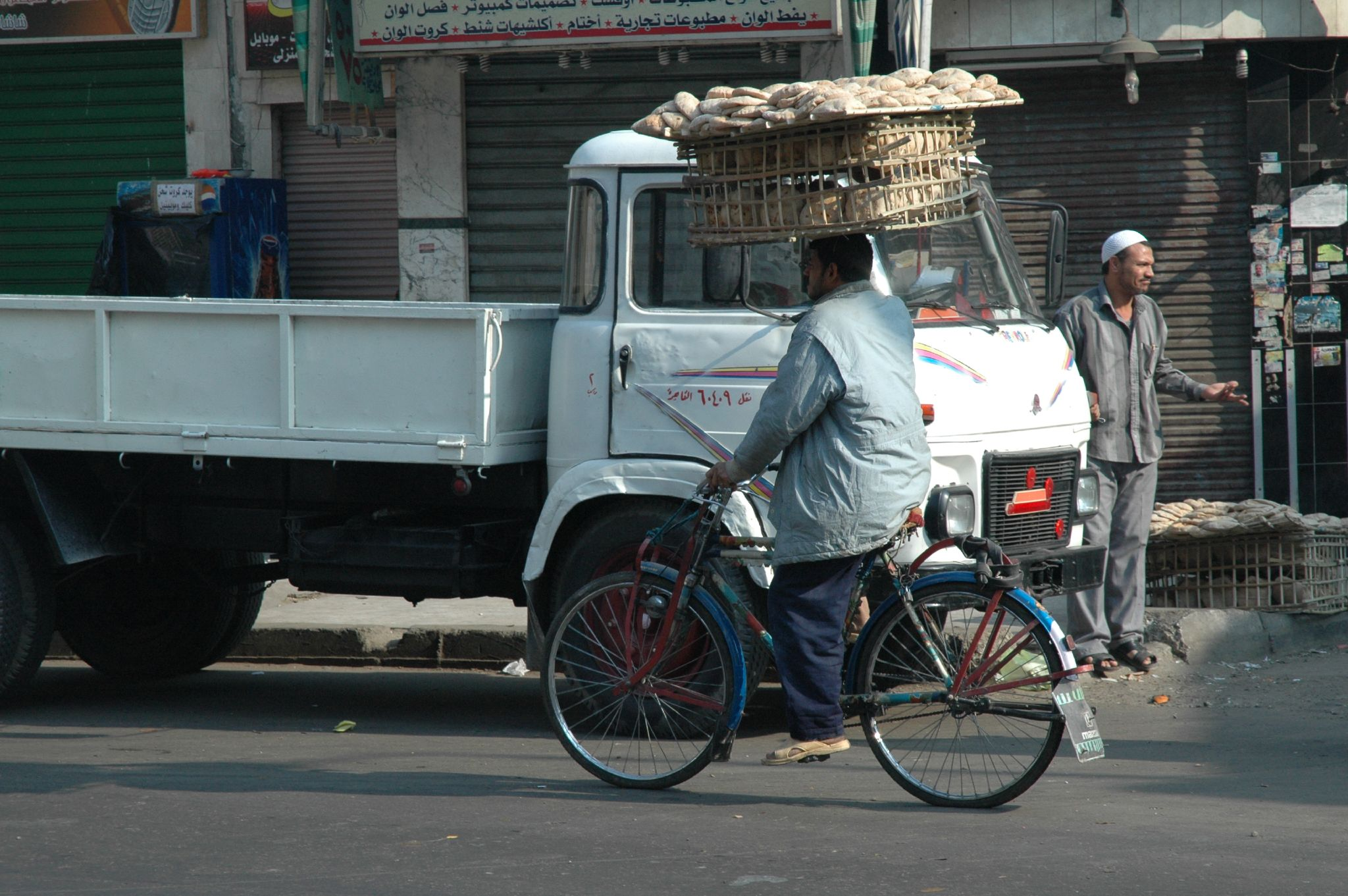 nel traffico del Cairo (e con le strade piene di buche) è un lavoro veramente difficile!!!!